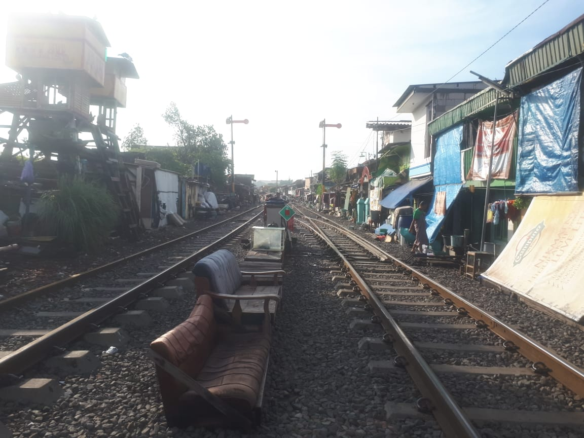 Emplasemen Stasiun Mesigit tahun 2020. Di sisi kanan terdapat rel menuju Stasiun Surabaya Pasarturi sedangkan sisi kiri terdapat rel menuju Stasiun Sidotopo